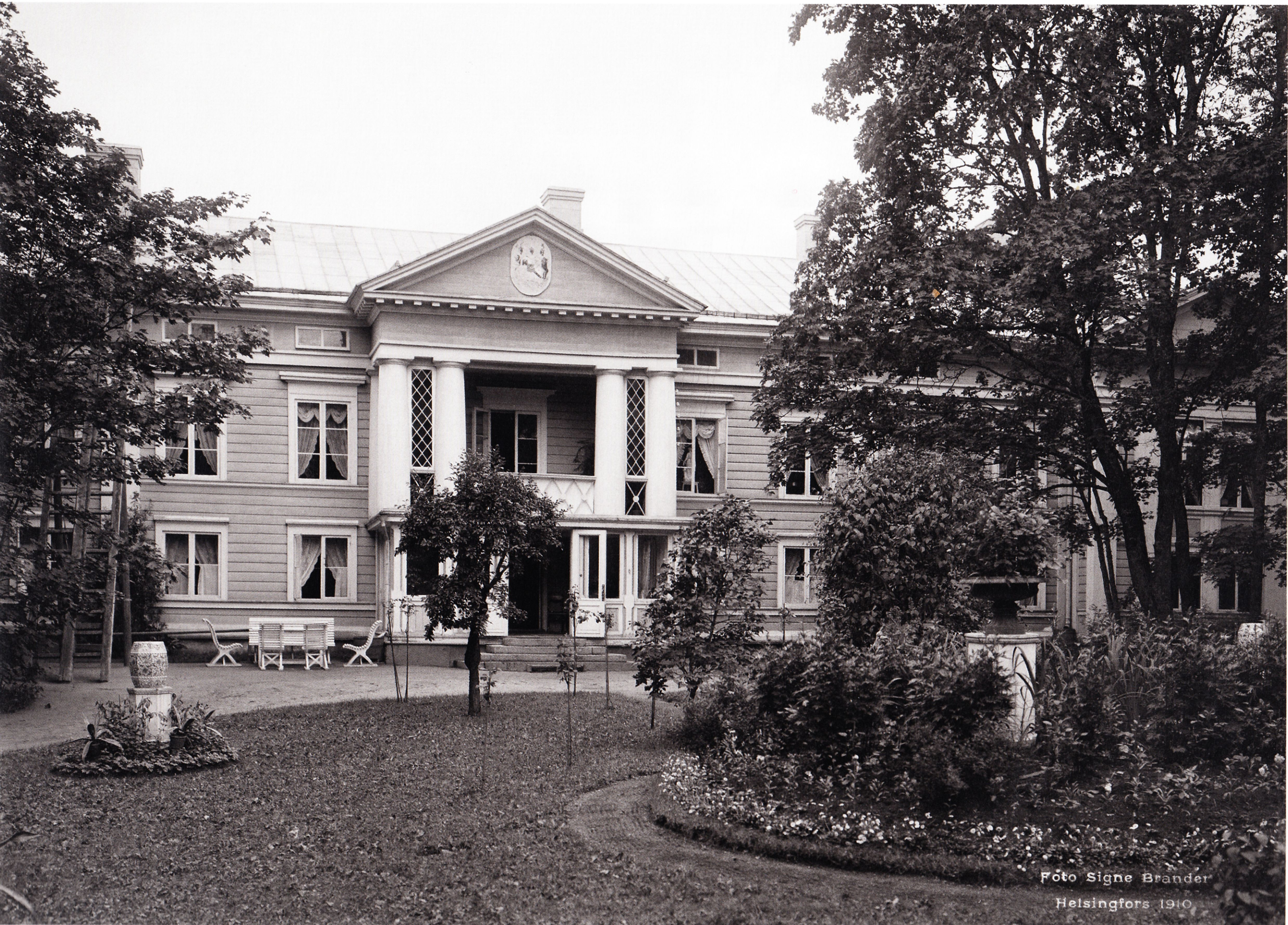 Ratulan kartano